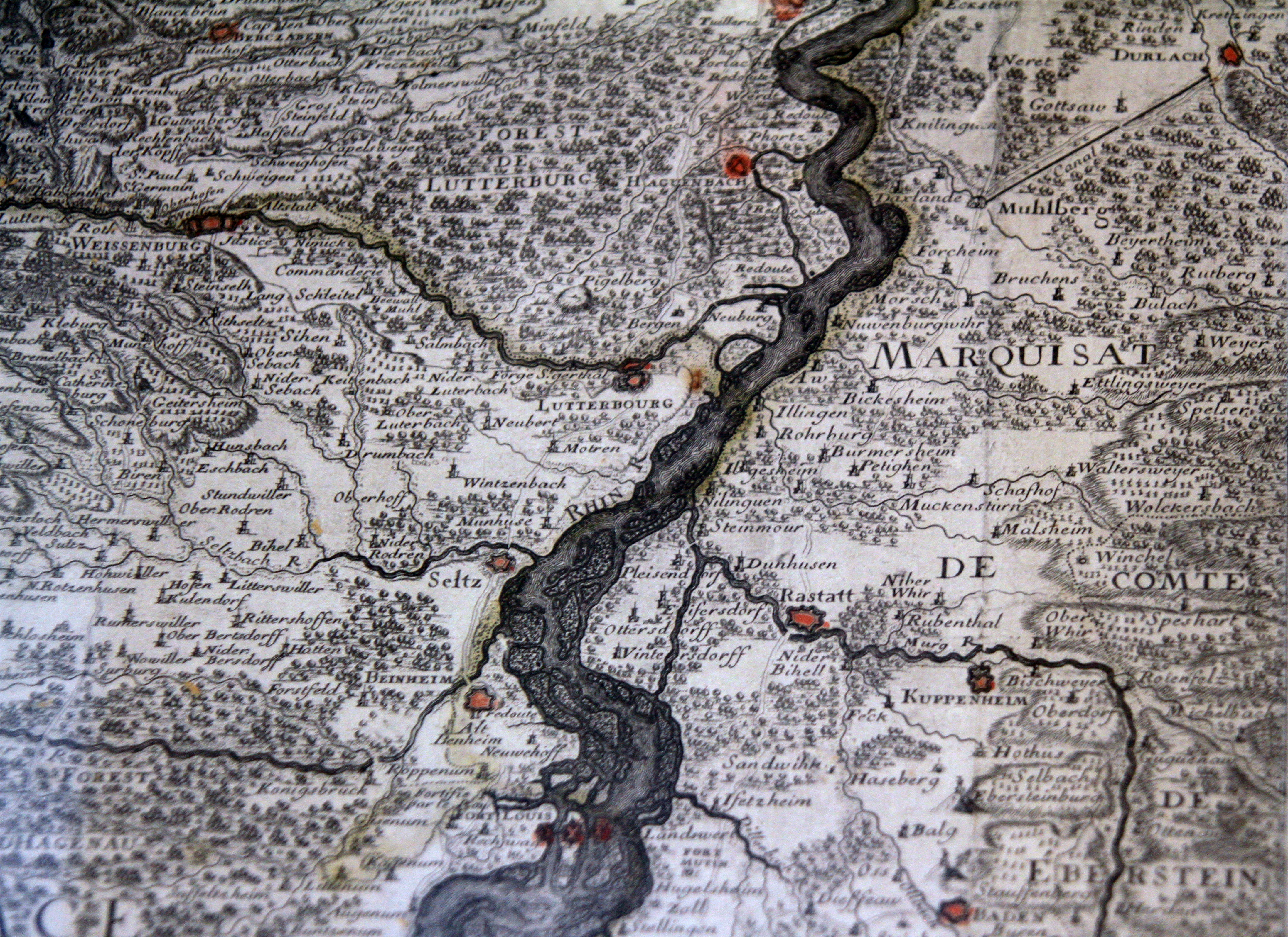 Ein Ausschnitt der Oberrheinkarte von 1708. Auf der Karte sind befestigte Plätze farblich markiert. Auf der Karte ist die Lage von Wüstungen, wie Dunhausen, ersichtlich.